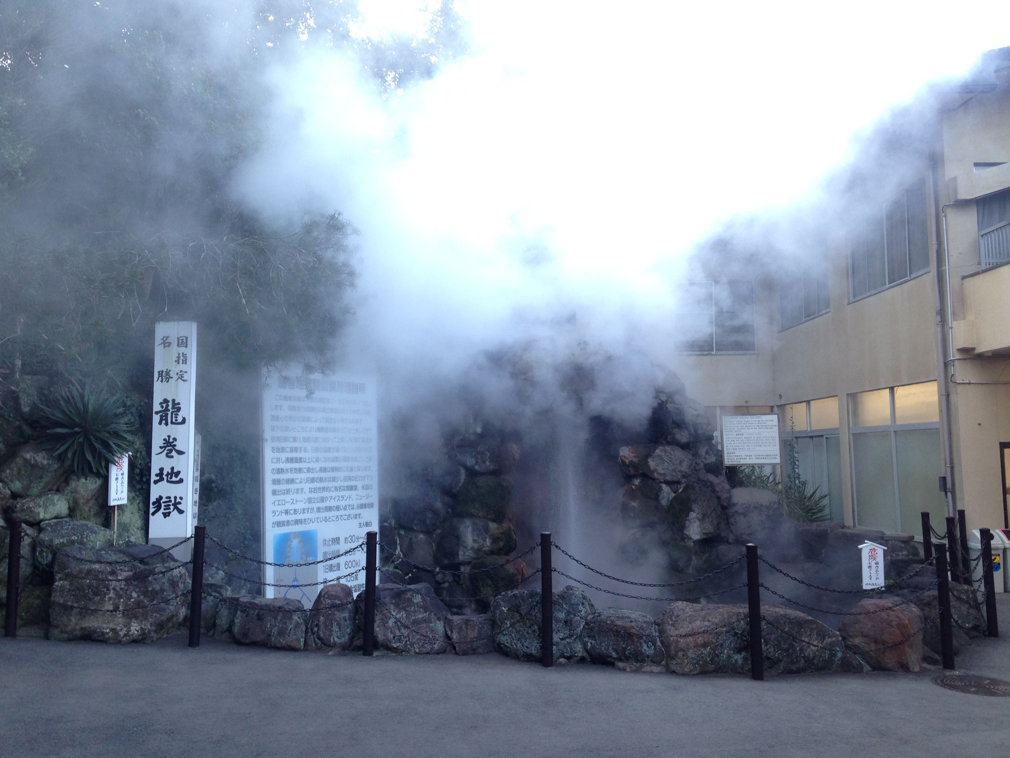 熱湯を噴き上げる龍巻地獄